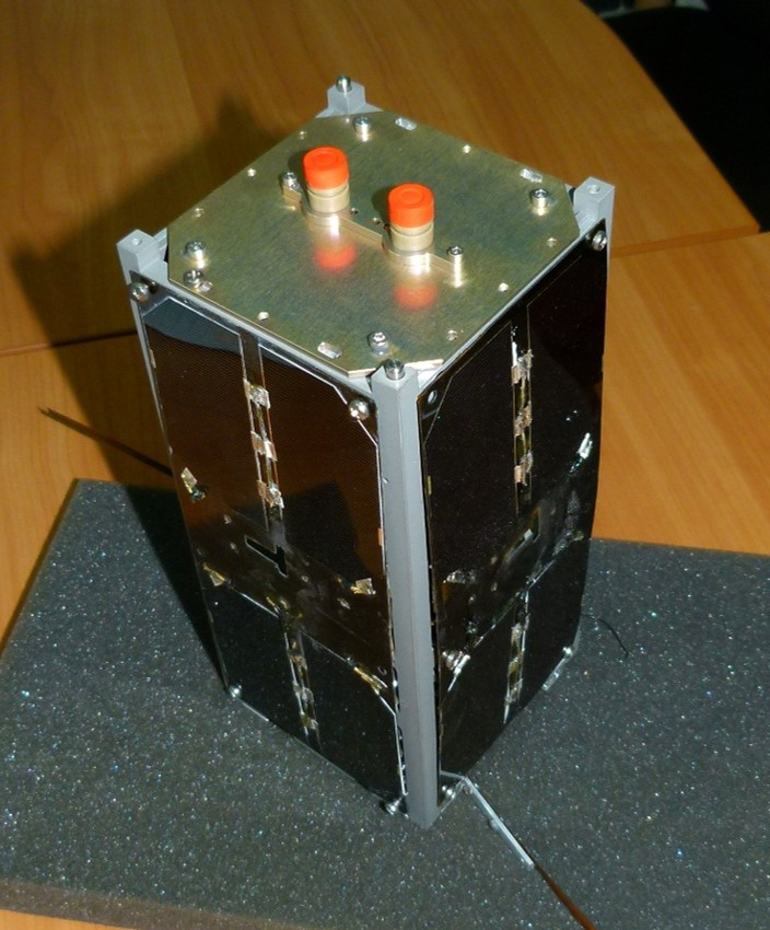 Супутник КПІ PolyITAN-2